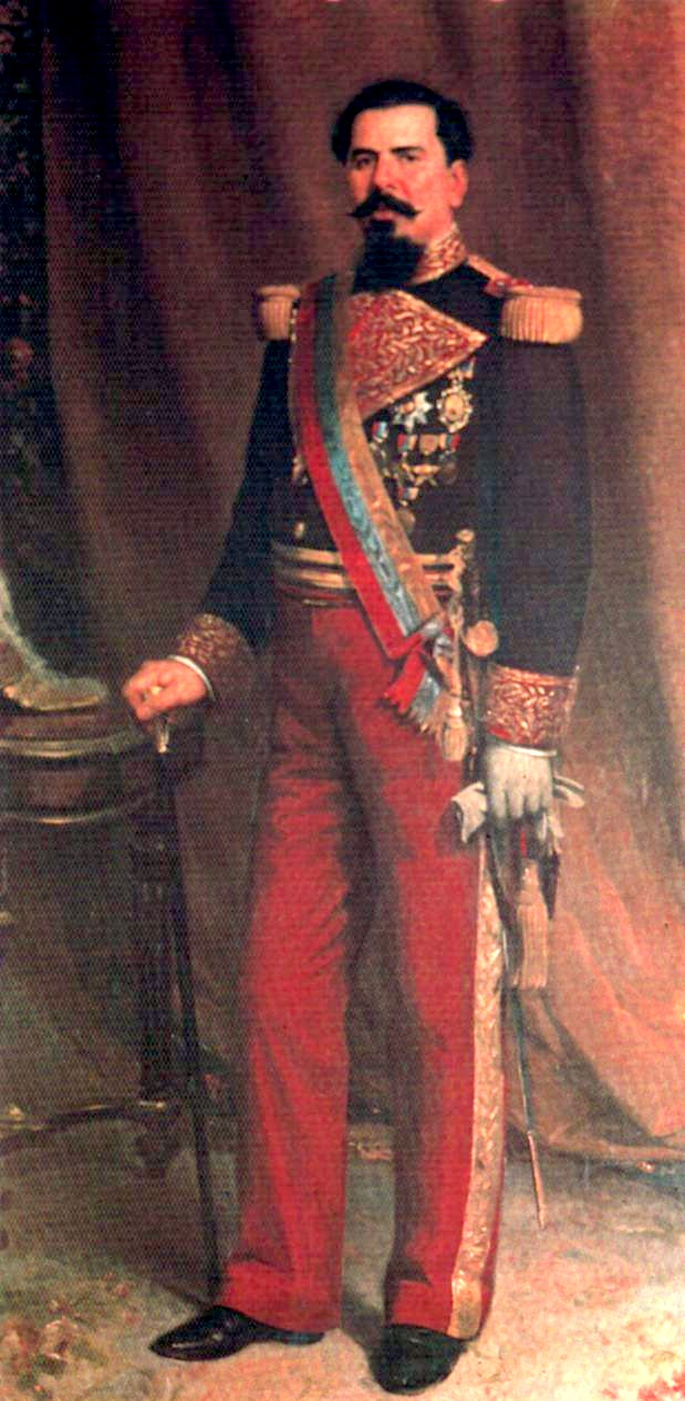 General Joaquin Crespo. Oleo/ Tela. Minsterio de Relaciones Exteriores. Caracas Venezuela